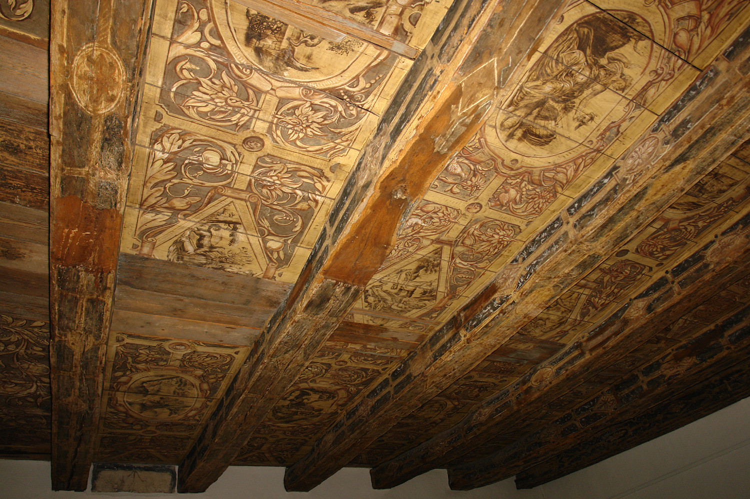 Bremen: Haus Heineken in der Sandstraße 3. Teil der Deckenmalerei von 1580